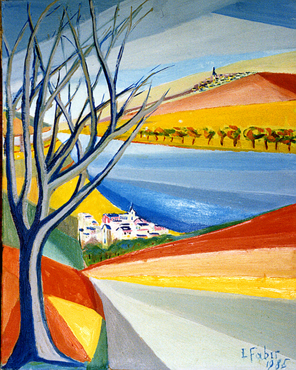 Ansicht auf Wormeldange im Tal. Die Mosel bildet die Grenze zu Deutschland.